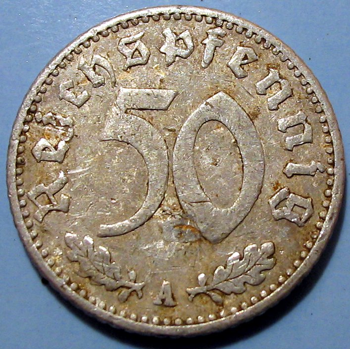 German Reichsmark